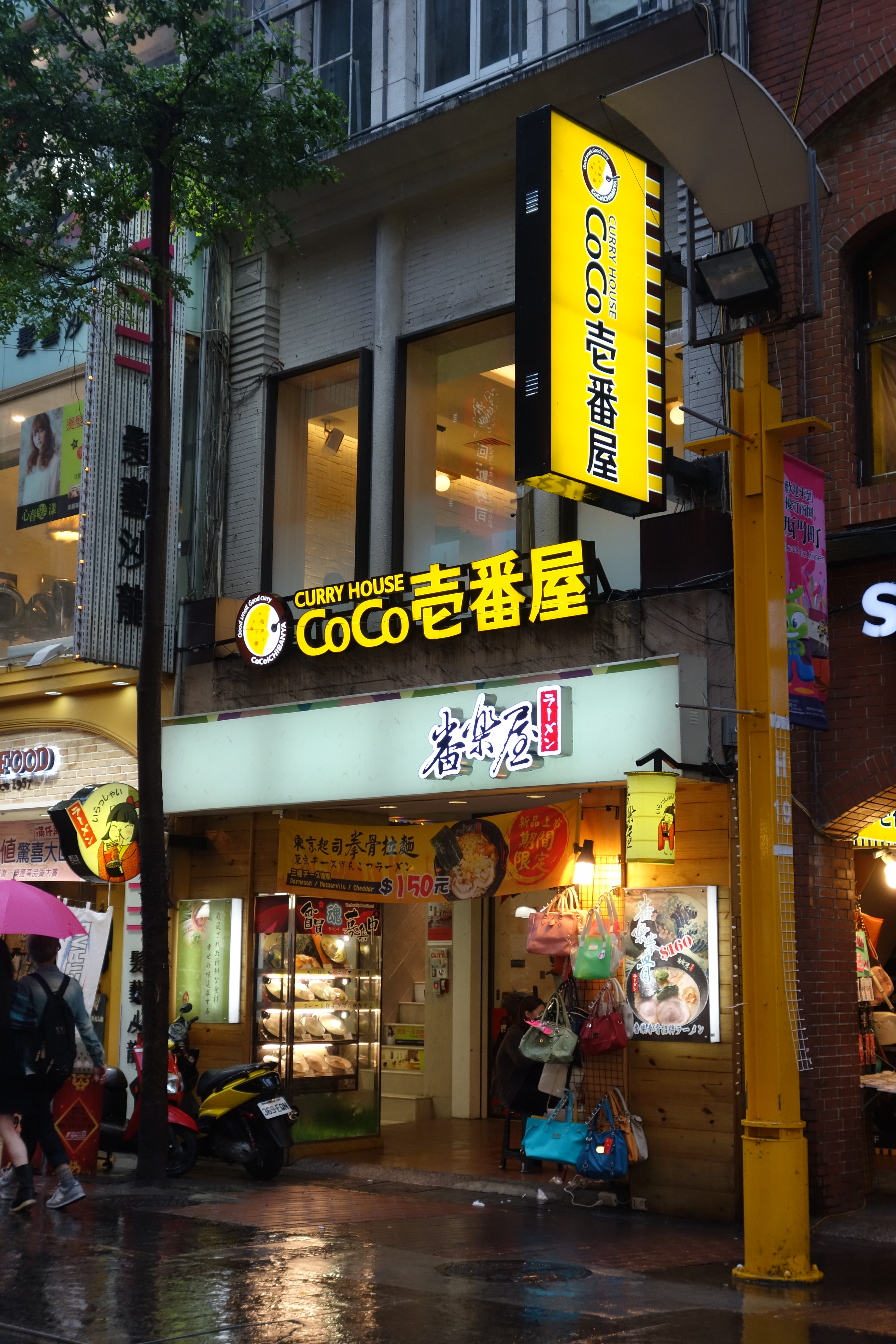 CoCo壹番屋台北漢中店，地址：臺北市萬華區漢中街49號2樓。